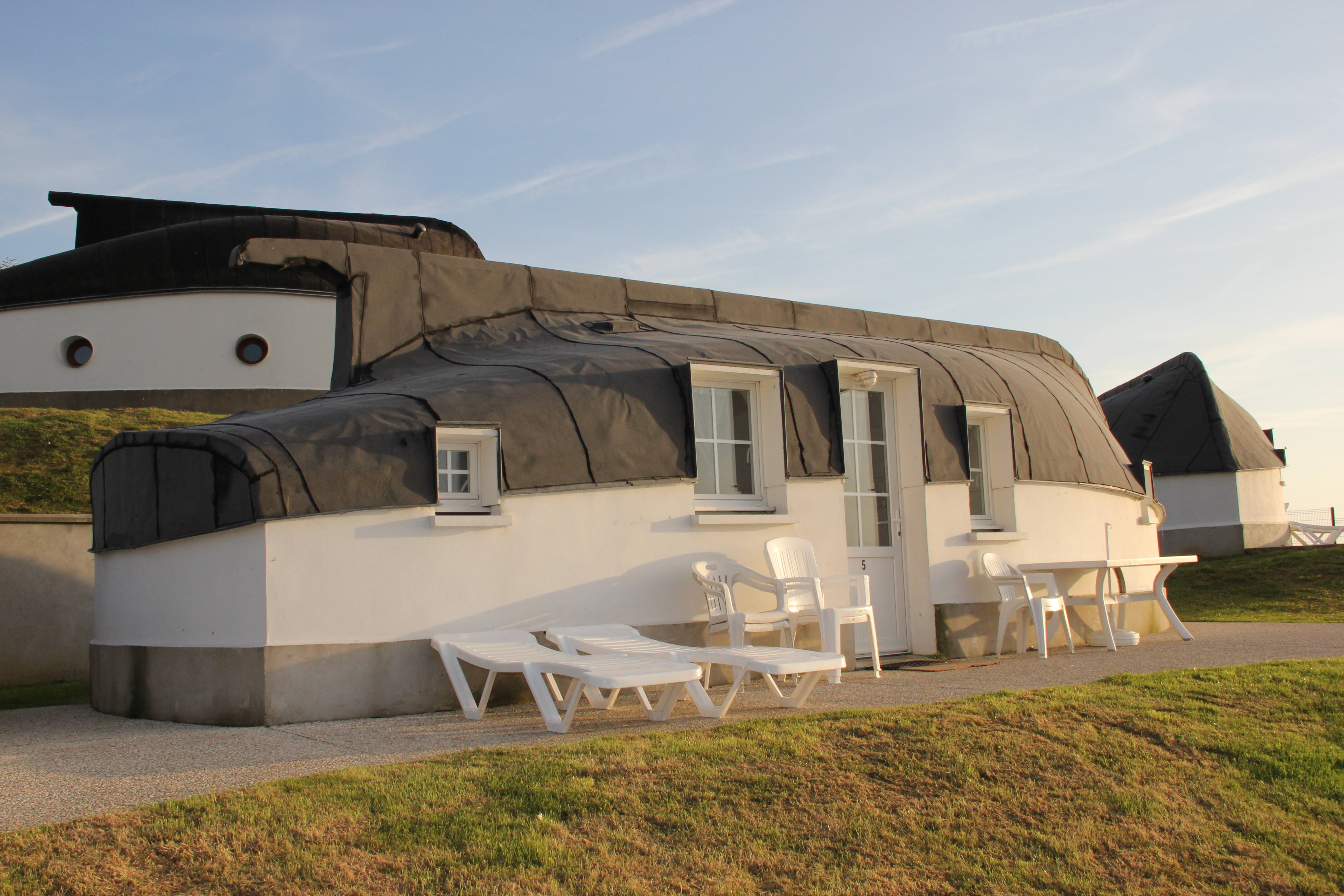 Le quilles en l'air, habitat typique des marins équihennois reconstruite en habitation légère de loisir